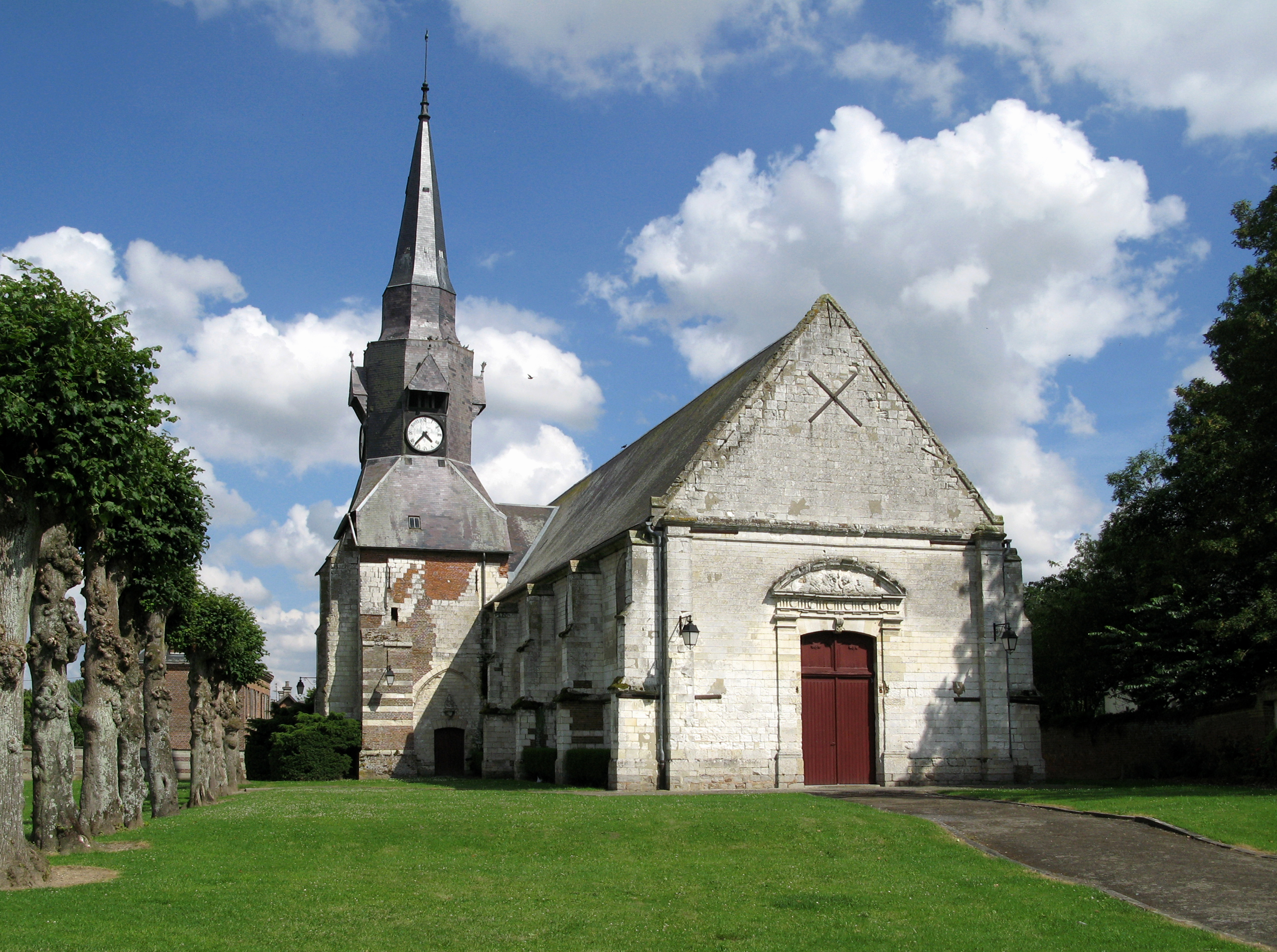 Revelles (Somme, France) - L'église. .